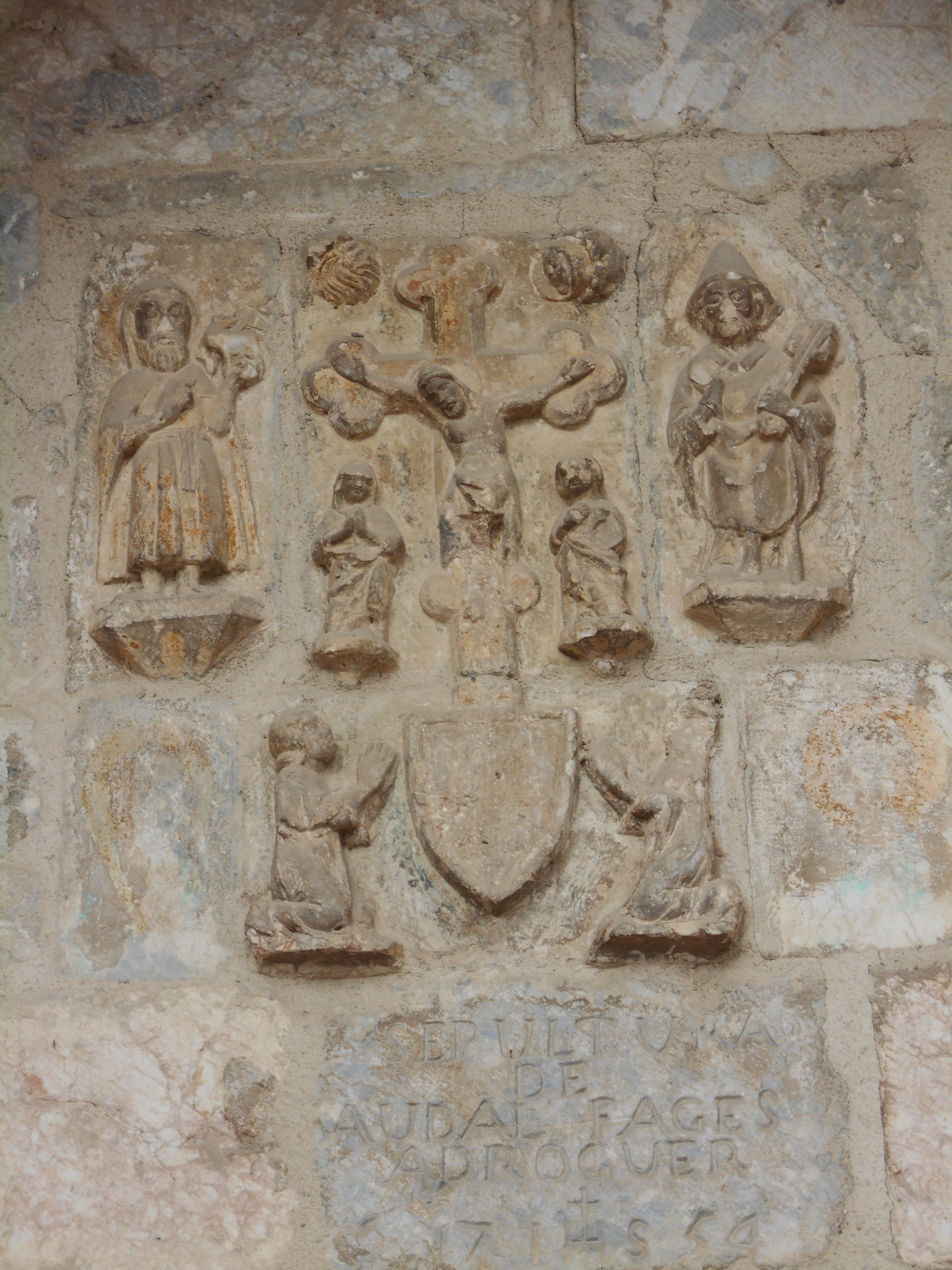 El Campo Santo de Perpinyà.